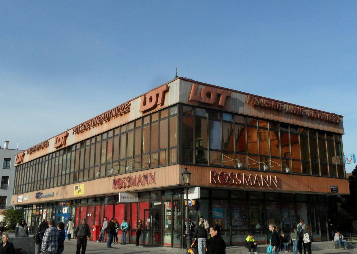 Dawny budynek LOT-u w Gdańsku od strony przejścia.